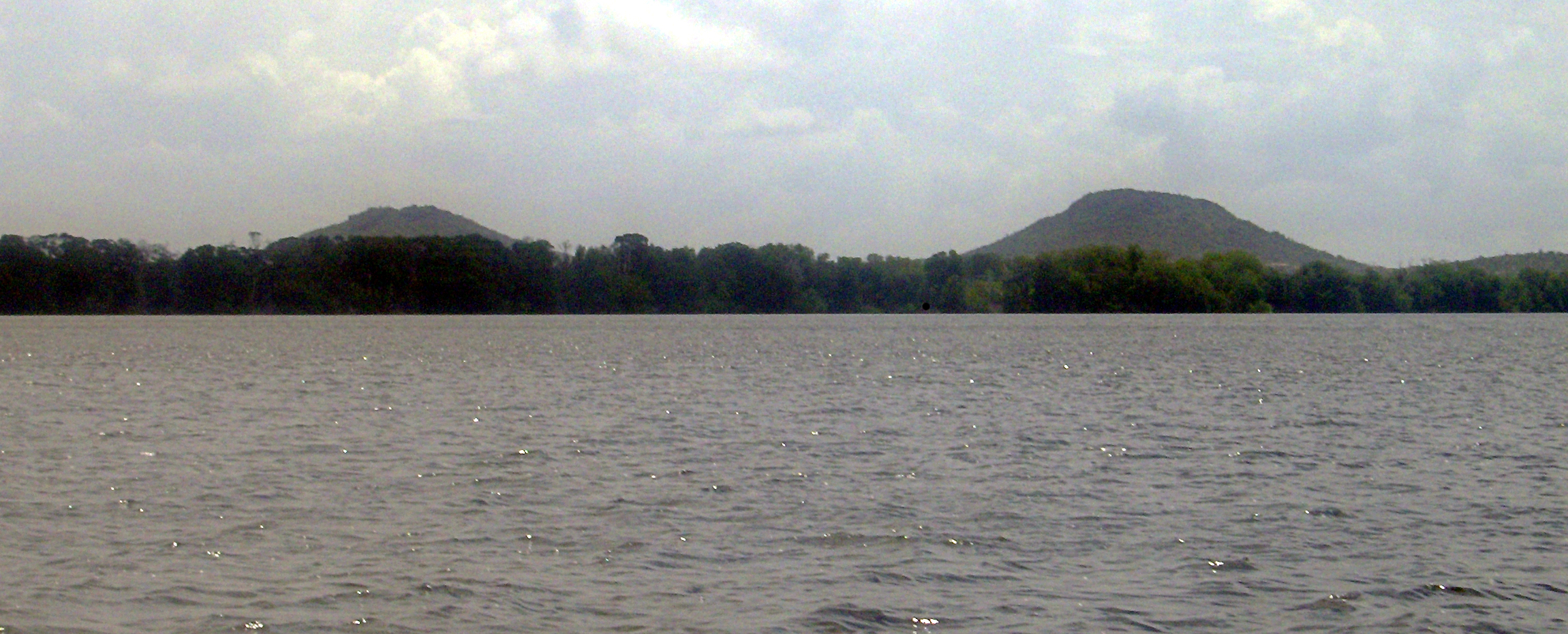 Monumento natural, Tetas de María Guevara, visto desde la Laguna de La Restinga, isla de Margarita, Venezuela.